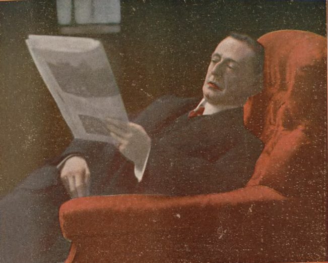 Joaquín Dicenta; eminente autor dramático; fotografía de Franzen.